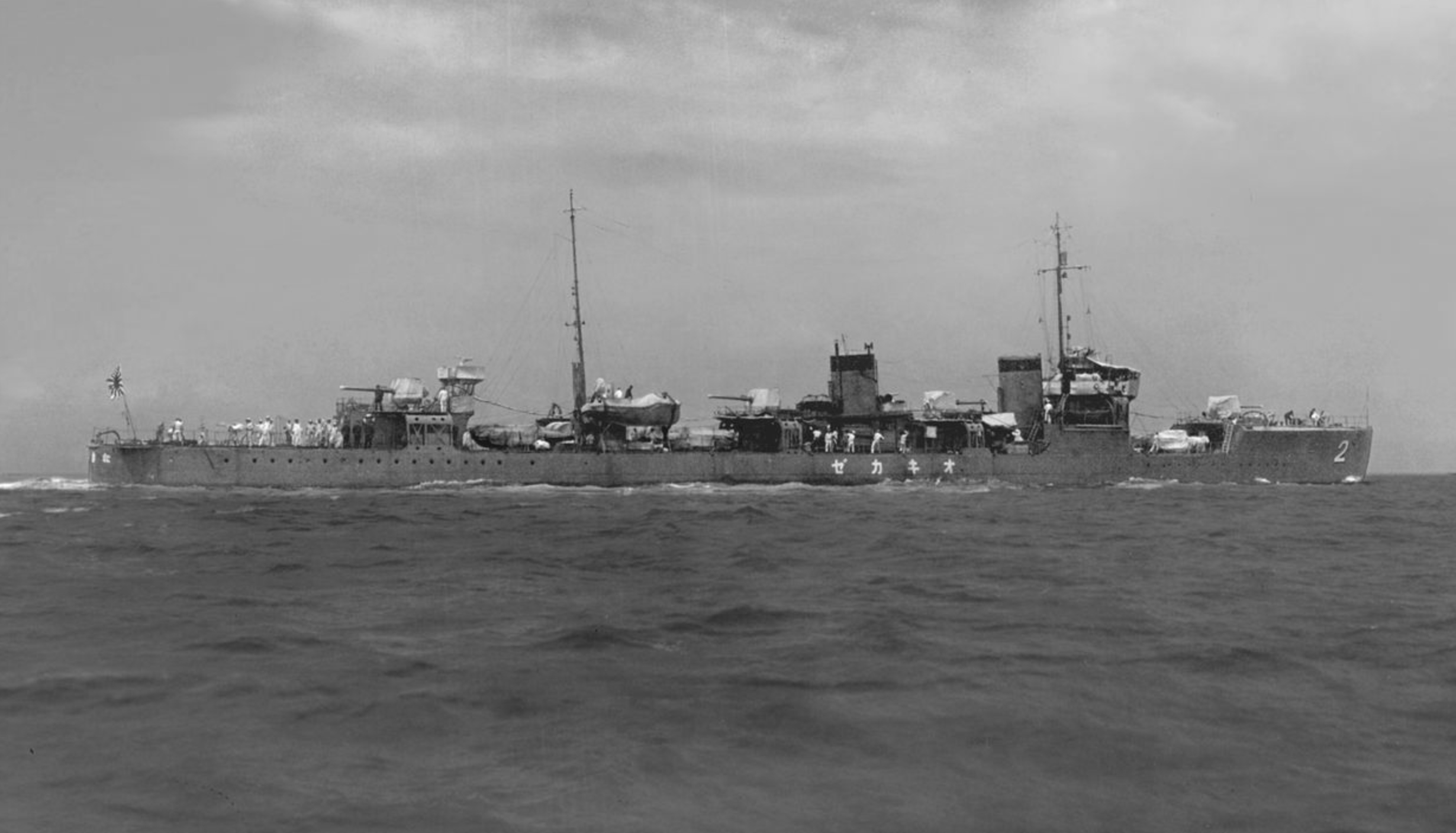 Imperial Japanese Navy destroyer Okikaze at Yokosuka.